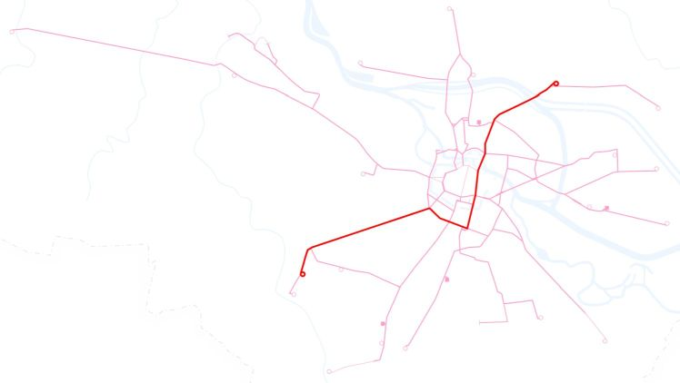 Poglądowa mapka przebiegu linii tramwajowej 11 we Wrocławiu.